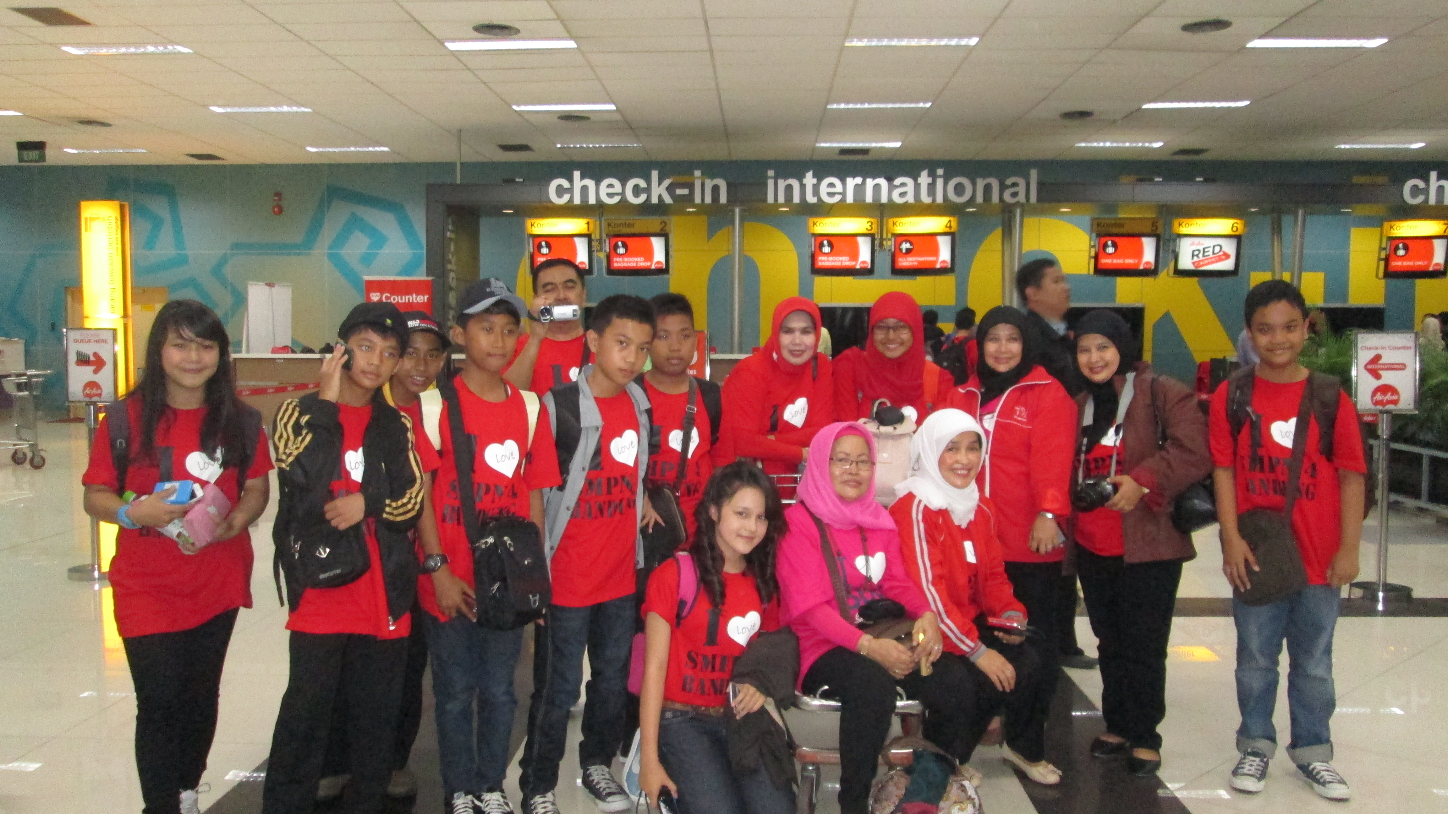 Rombongan SMP Negeri 4 Bandung - SHIA Jakarta sedang Check in untuk naik ke pesawat AK 1389 9M-AFG